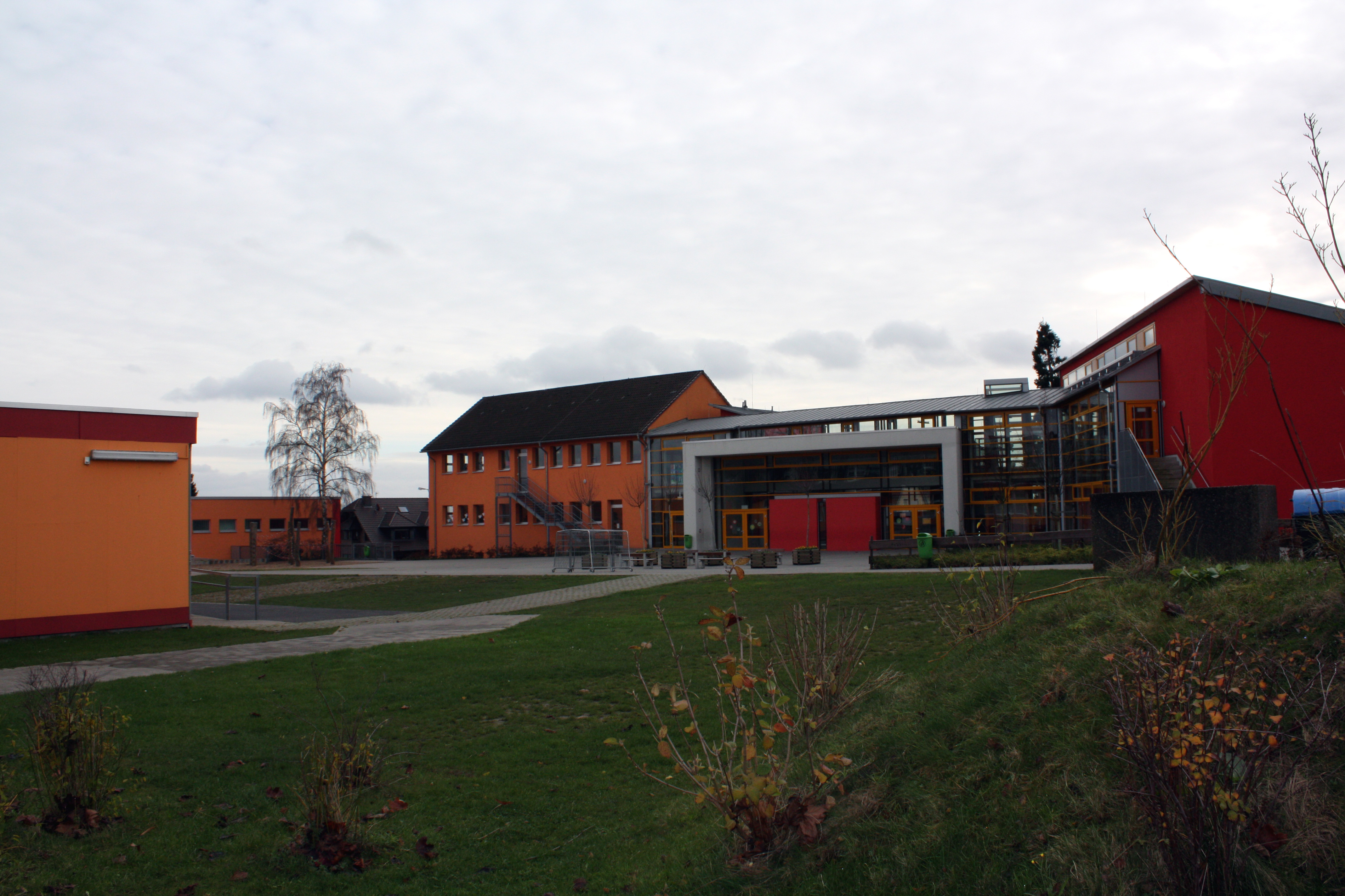 Hürth-Fischenich, die neuen Schulgebäude